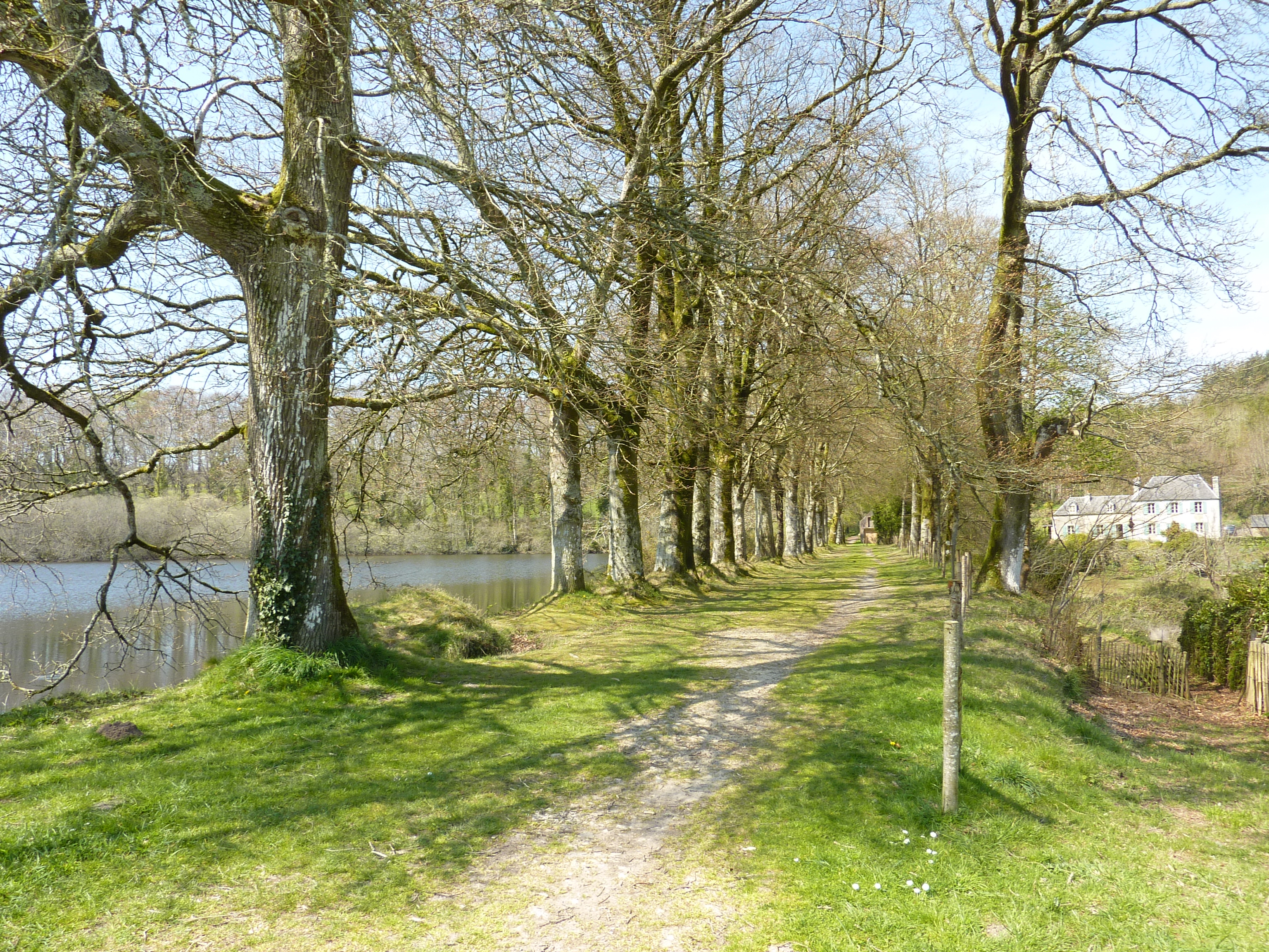 La chaussée de l'abbaye du Relec et l'un des étangs